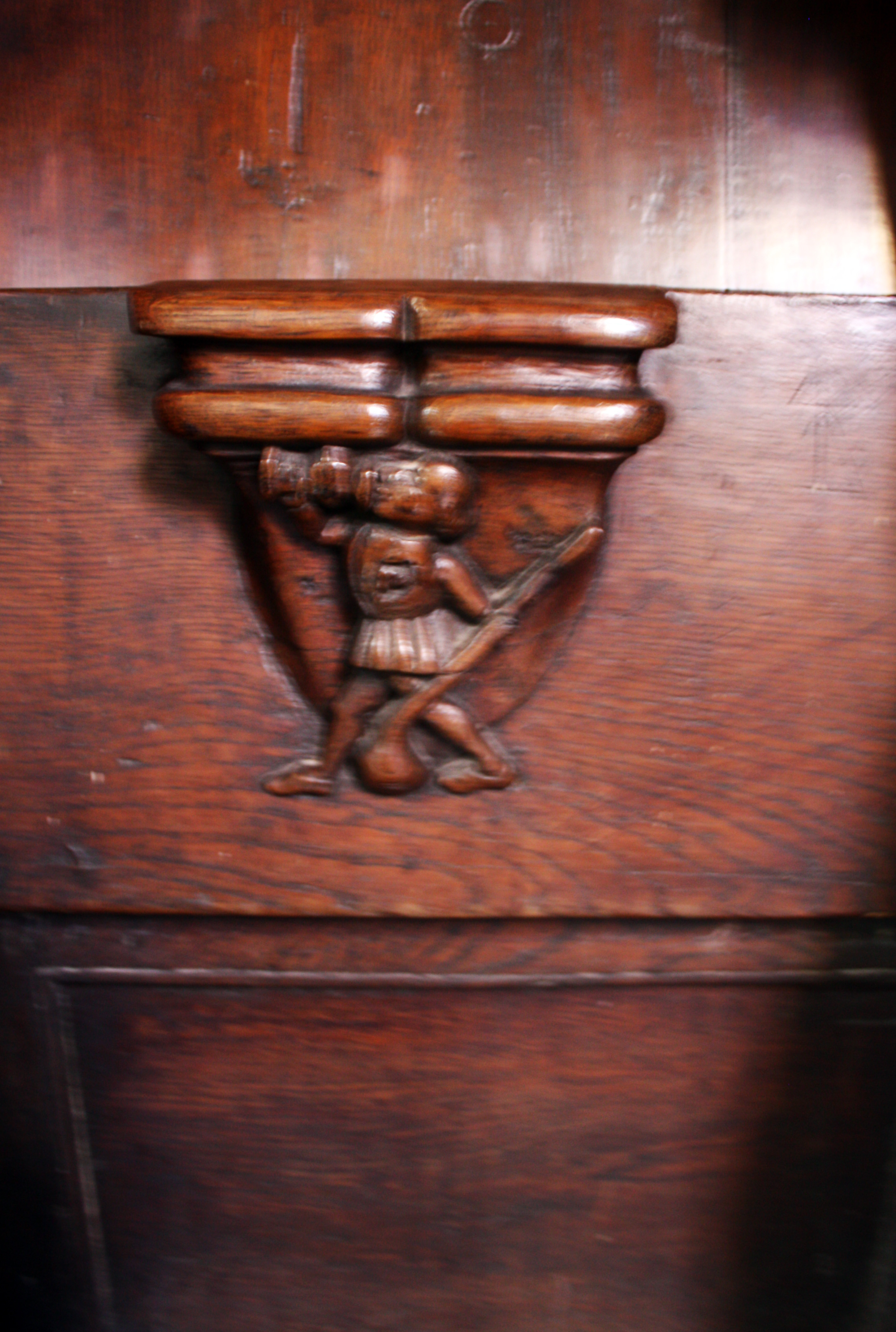 Das Chorgestühl von St. Maria Lyskirchen, so genannte Misericordien, zeigt neben Wappen und Fabelwesen auch einen Zecher